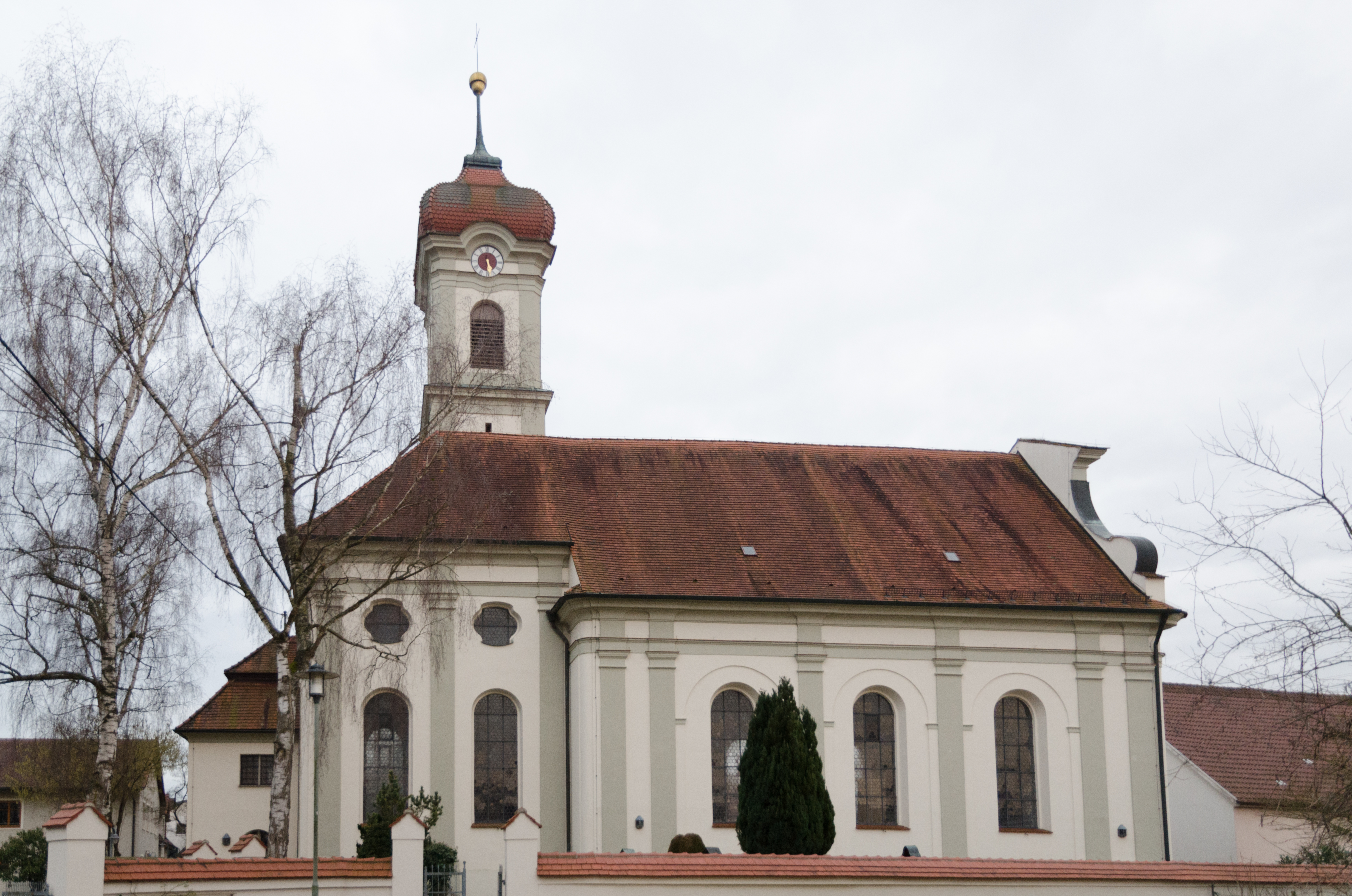 Nersingen, Lkrs. Neu-Ulm, Ortsteil Straße, Kath.m Pfarrkriche St. Johann Baptist